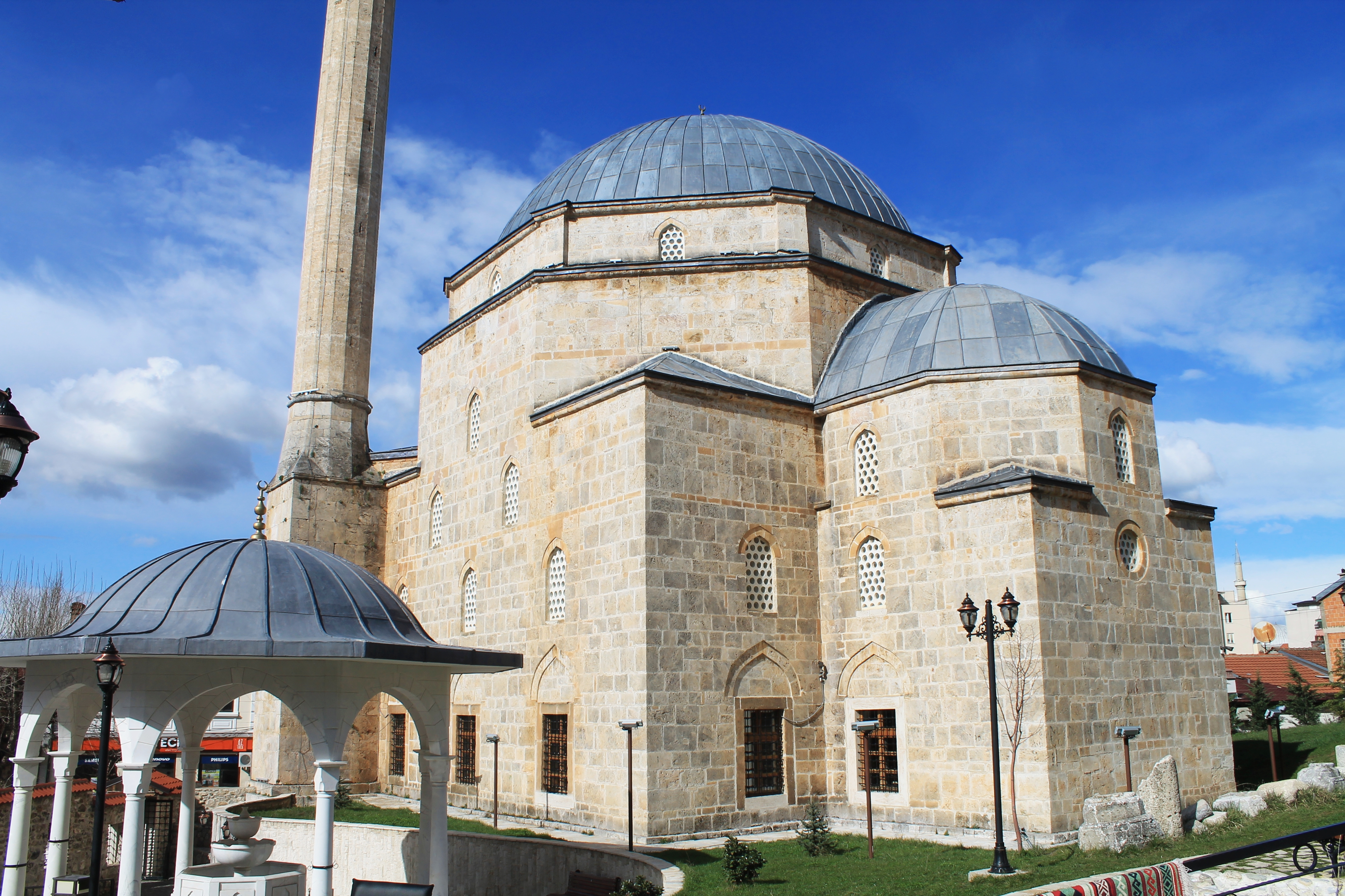 Xhamia e Sinan Pashës (Prizren)